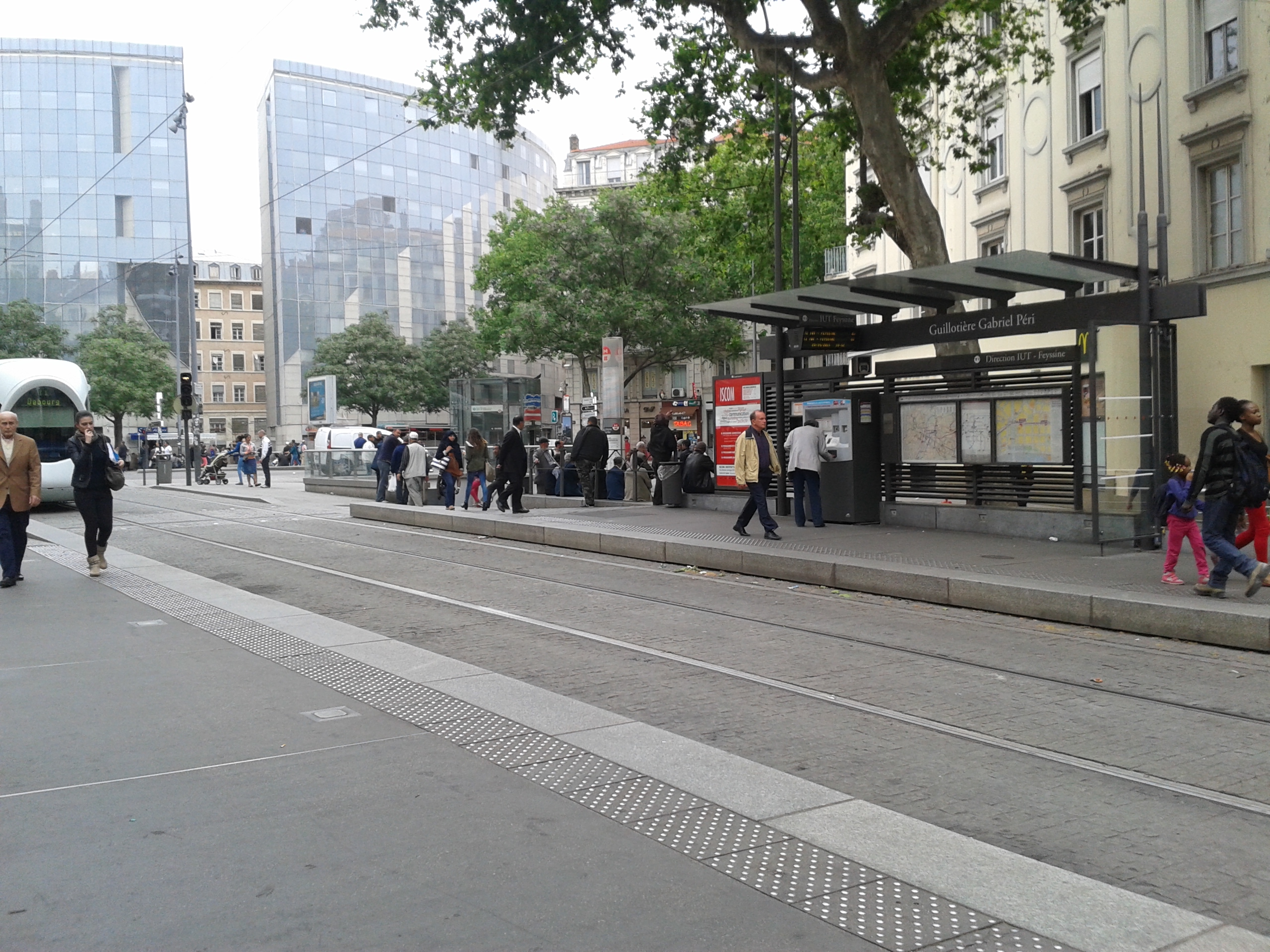 Extérieur de la station Guillotière - Gabriel Péri, ligne D du métro et ligne T1 du tramway lyonnais.